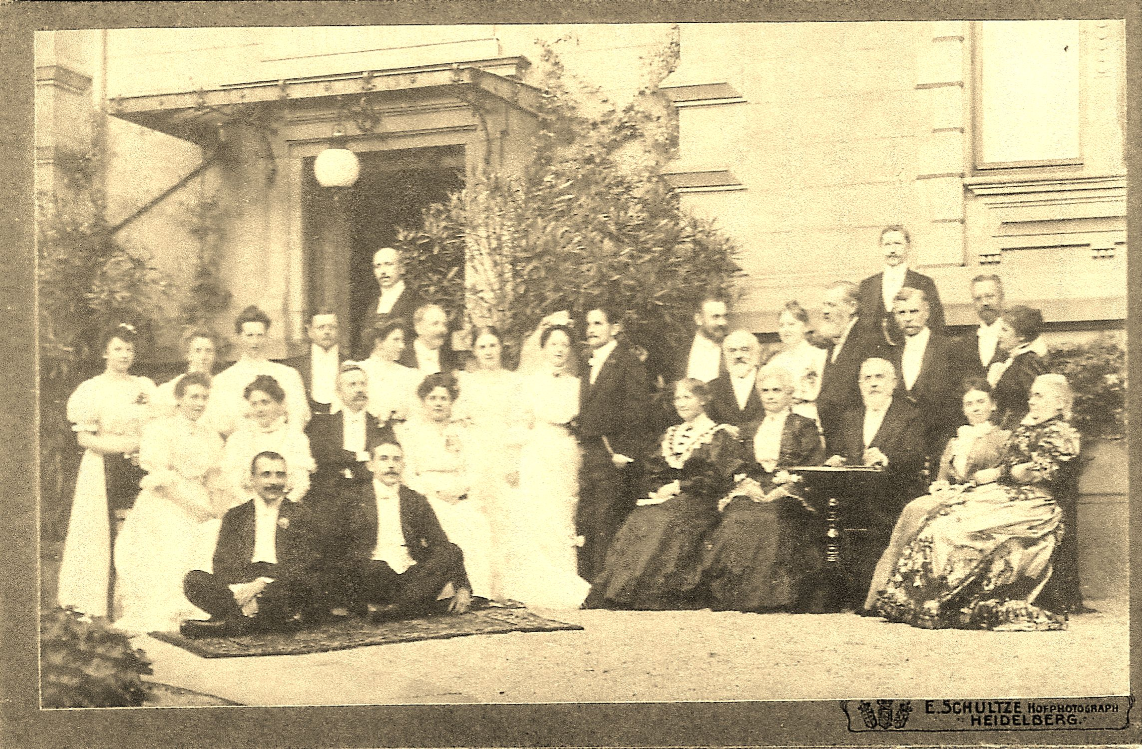 Hochzeitsphoto von August Schoetensack mit Luise Bülow. Auf dem Foto sind zu sehen:Oskar von Bülow mit Ehefrau Sophie, Otto Schoetensack mit Ehefrau Marie, das Brautpaar, die Geschwister der Brautleute und weitere Verwandte. Foto von E. Schultze, Inhaber Max Kögel in Heidelberg